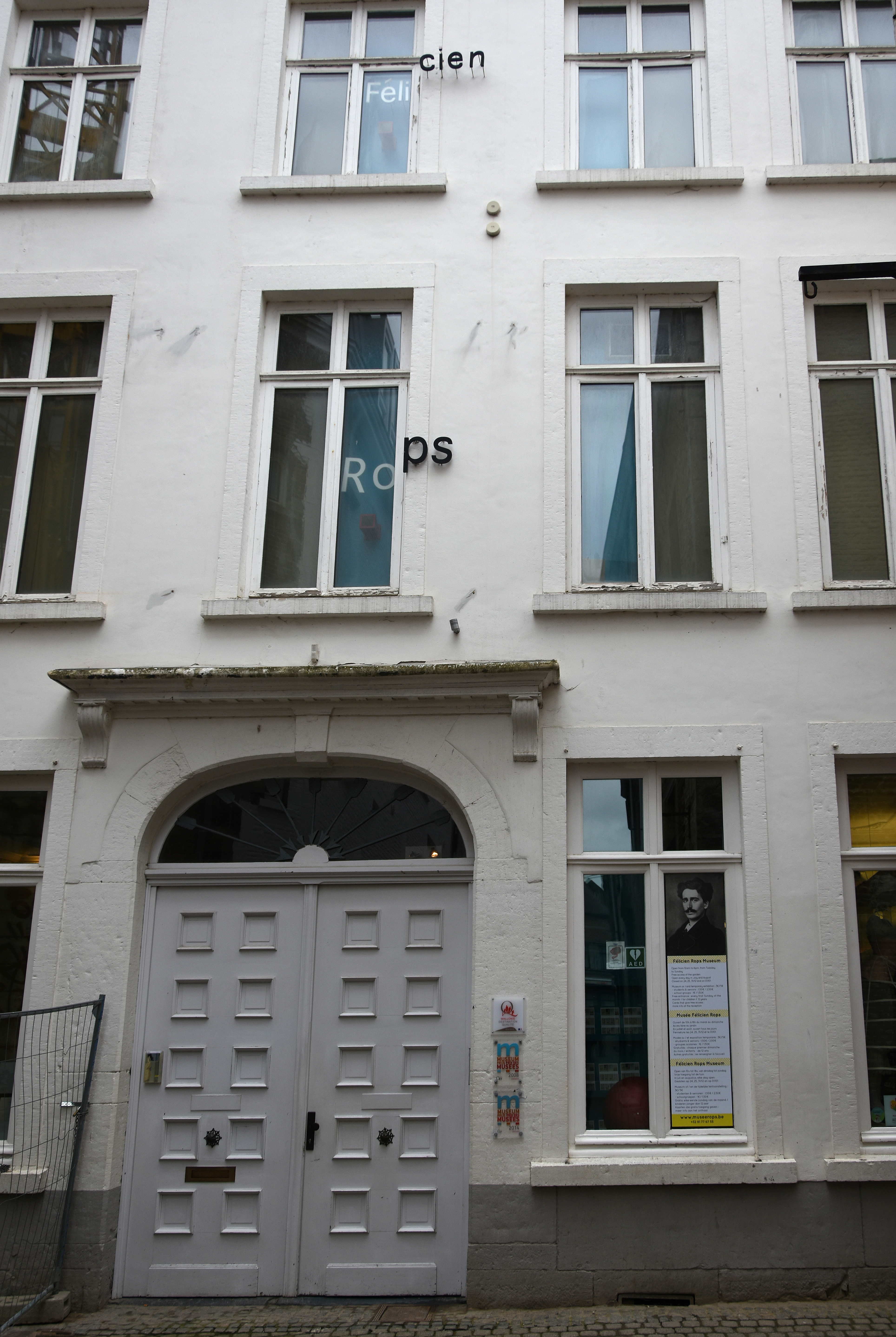 Voorgevel van het Musée provincial Félicien Rops te Namen, rue Fumal 12